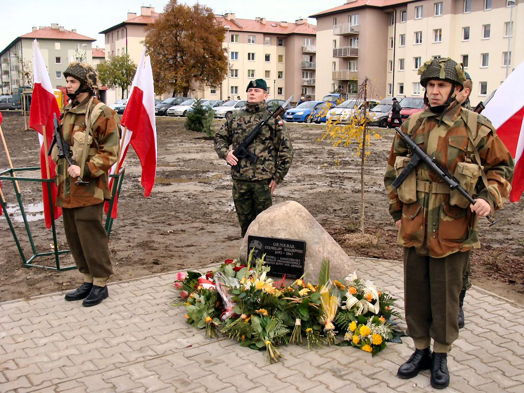 Uroczystość nadania nowej ulicy w Szczecinie imienia gen. Stanisława Sosabowskiego. Szczecin, 18.10.2008